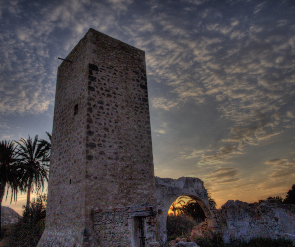 Torre "El de Conde". La Condomina. Alicante. Spain